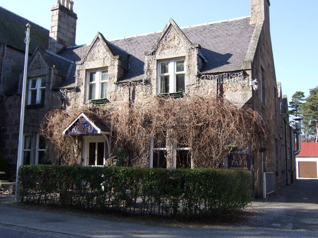 Loch Kinnord Hotel, Dinnet, Aberdeenshire